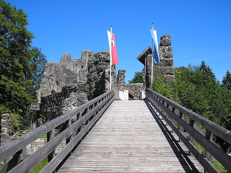 Burg Alttrauchburg (Markt Weitnau, Landkreis Oberallgäu, Bayerisch-Schwaben). Hauptburg, Brücke und Tor. Eigene Aufnahme, Juli 2007 / Alttrauchburg castle near Weitnau (Bavaria, Germany). Central castle, bridge and gate. Own photo, July 2007